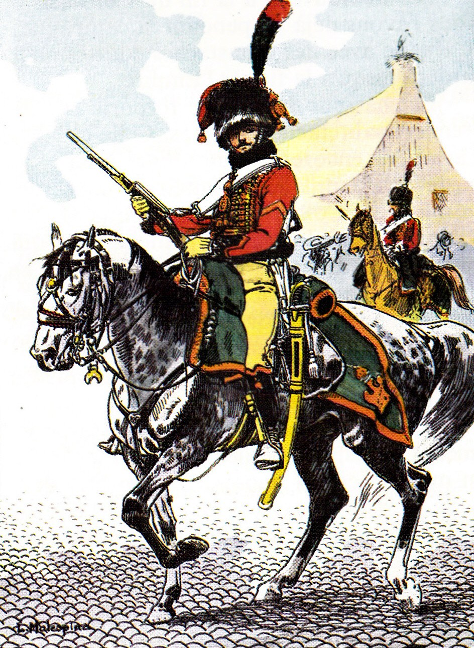 Chasseur à cheval de la Garde impériale du piquet d'escorte, portant la tenue de service (1805).